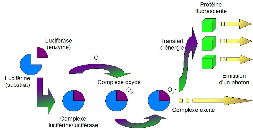 mecanisme général des réactions de bioluminescences